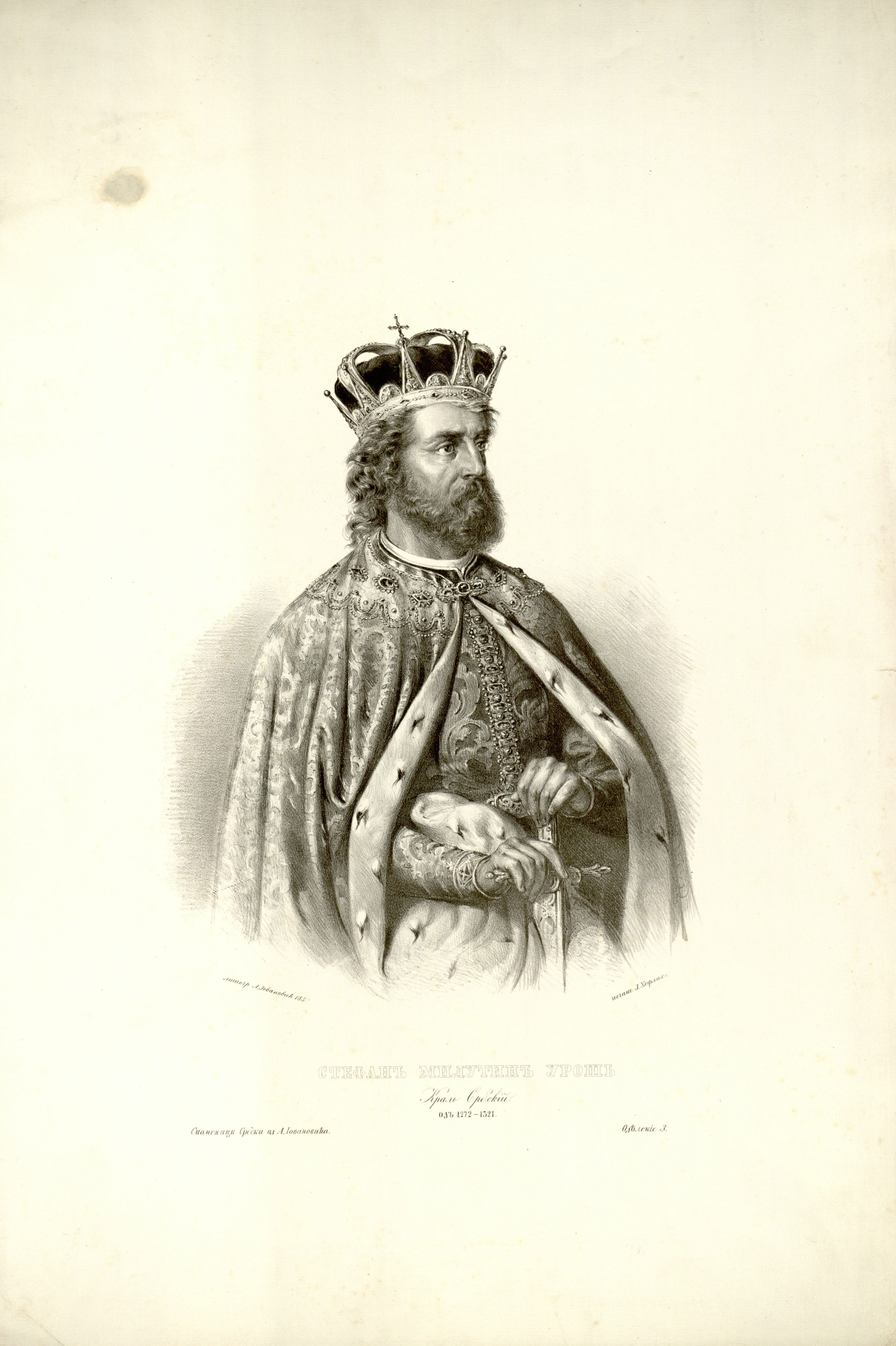 Lithograph of king Stefan Milutin by Anastas Jovanović. Caption: литогр. А. Іовановић 1852печат Ј. Хефлих. СТЕФАНЪ МИЛУТИНЪ УРОШЬ Краль Србскій одъ 1272-1321. Споменици Србски од А. Іовановића.Одѣленіе 3.